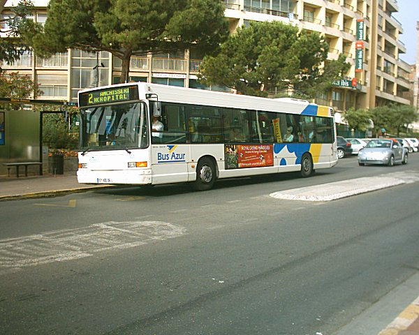 Bus Azur in 2004.